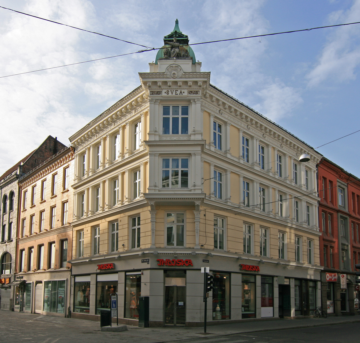 Karl Johans gate 6, Oslo. Bygd for Livsforsikringsselskapet Svea, 1883. Arkitekt: Ove Ekman.